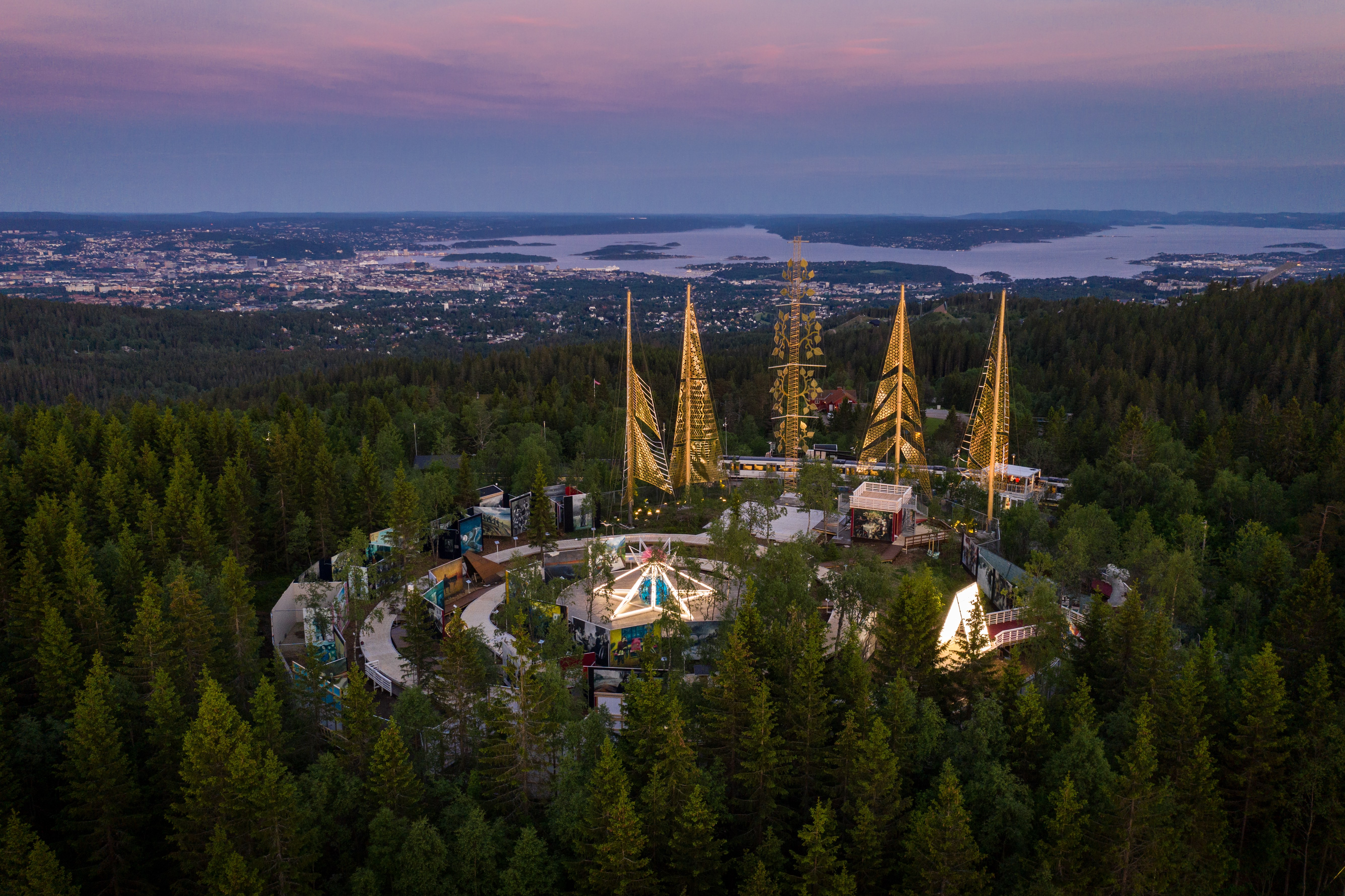 Roseslottet dronefoto: Tomazs Majewski